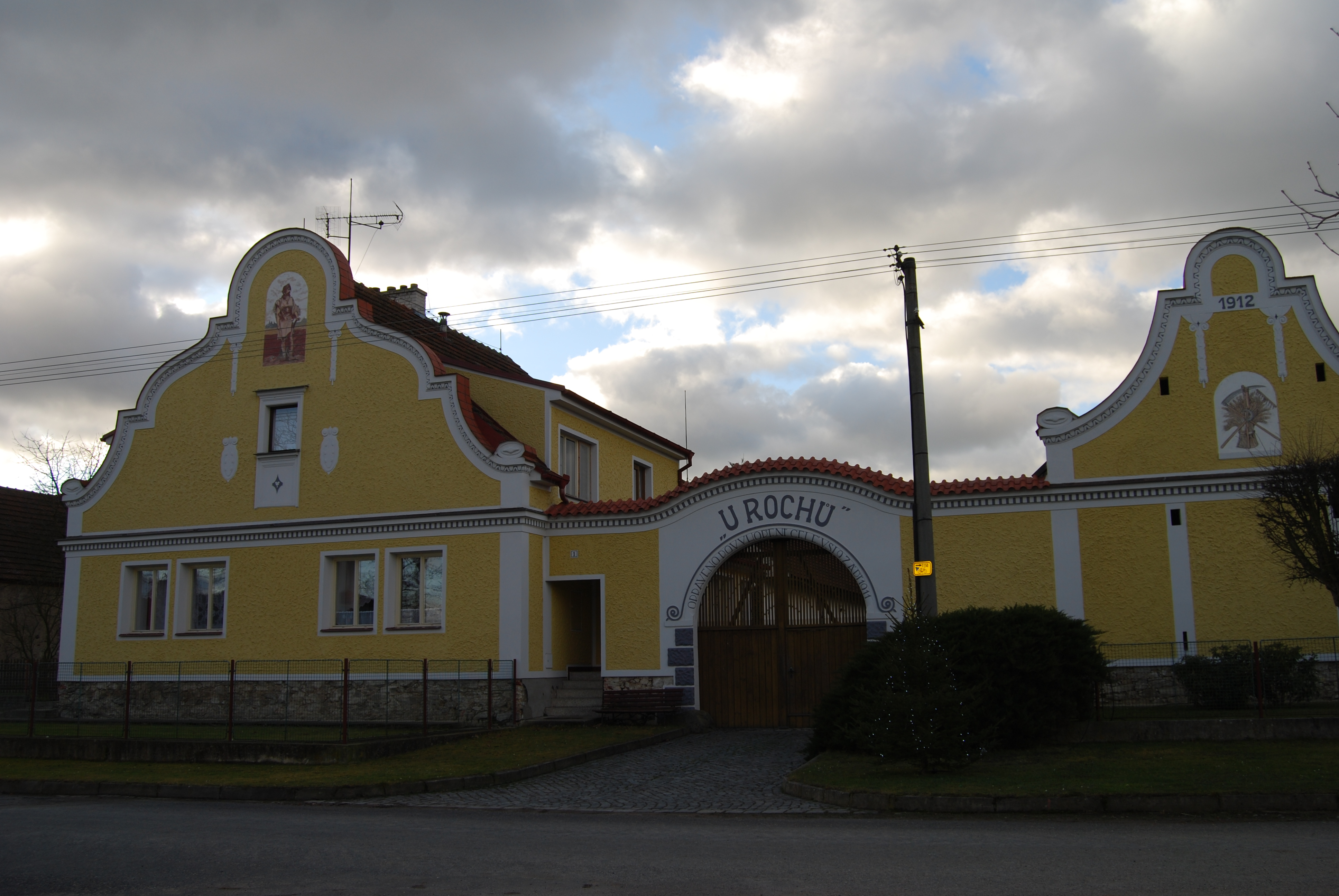 Usedlost čp. 1 v obci na návsi. Jamný (část obce Záhoří). Okres Písek. Česká republika.